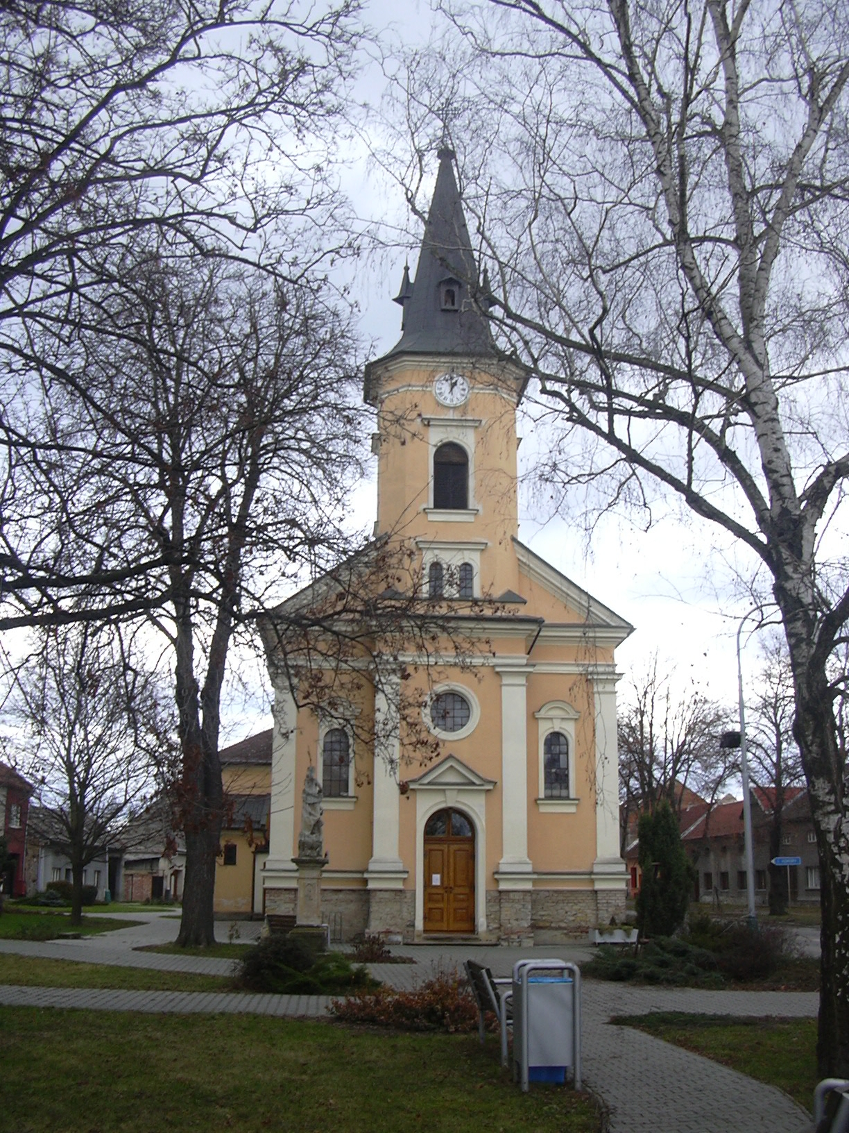 Obecní kostel sv. Jana Křtitele v Brodku u Přerova.